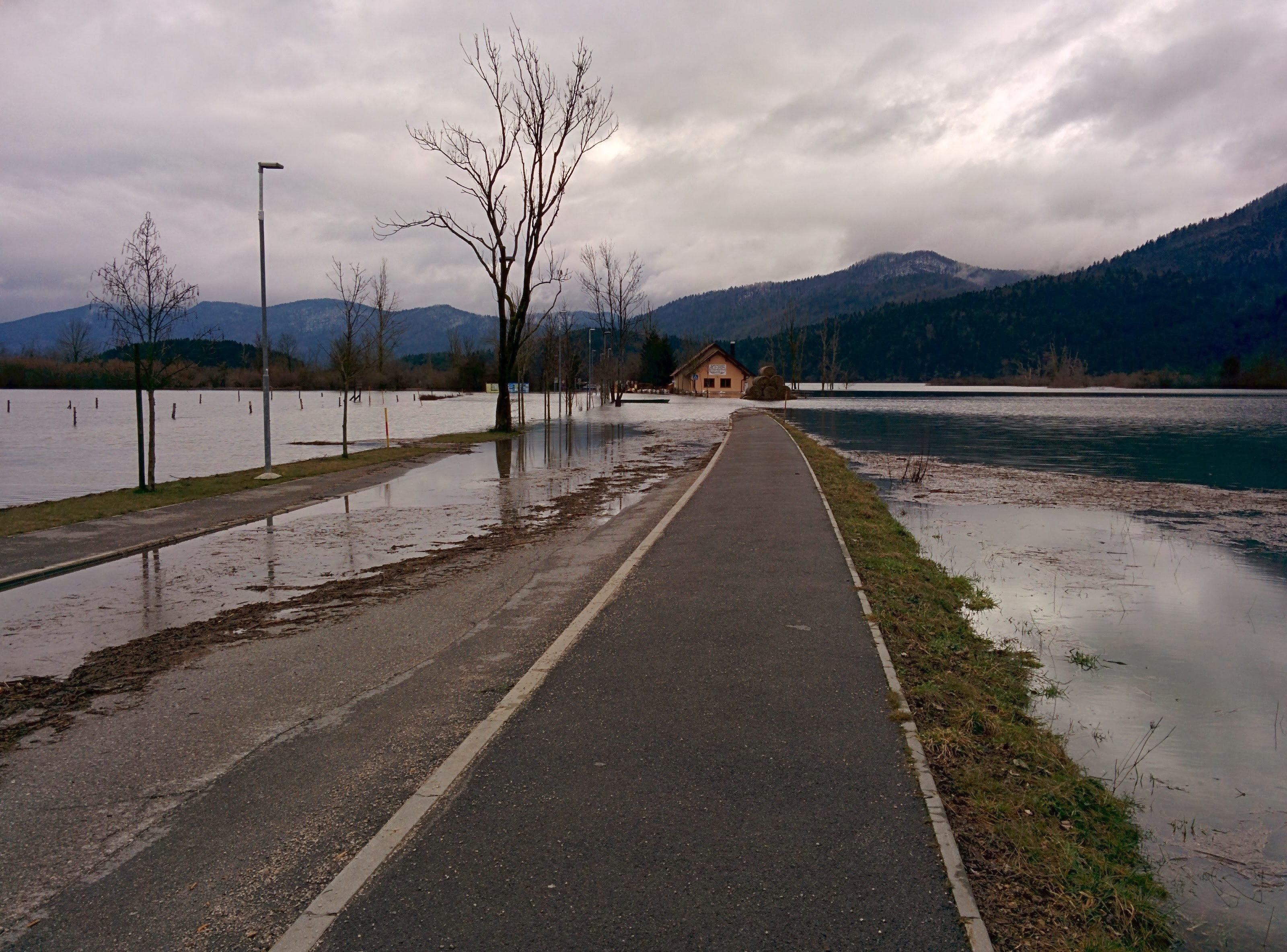 Poplava na Cerkniškem jezeru leta 2014